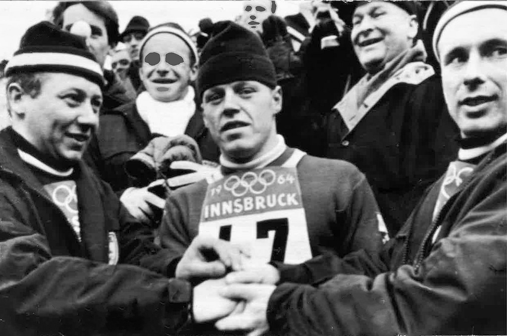 Medaljetrioen i begge bakkene i OL i Østerrike i 1964. Fra venstre: Torgeir Brandtzæg, Veikko Kankkonen og Toralf Engan.